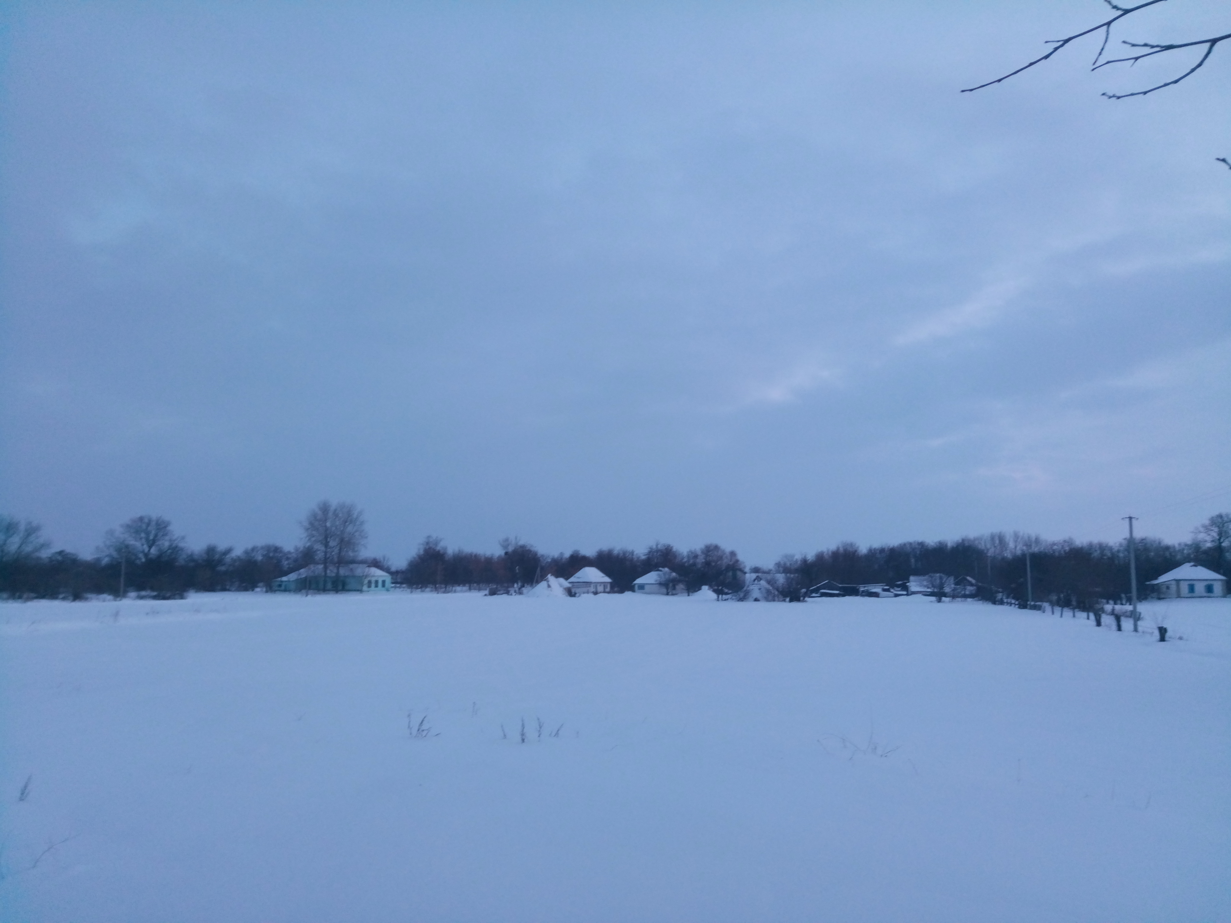 Вид на хати у селі